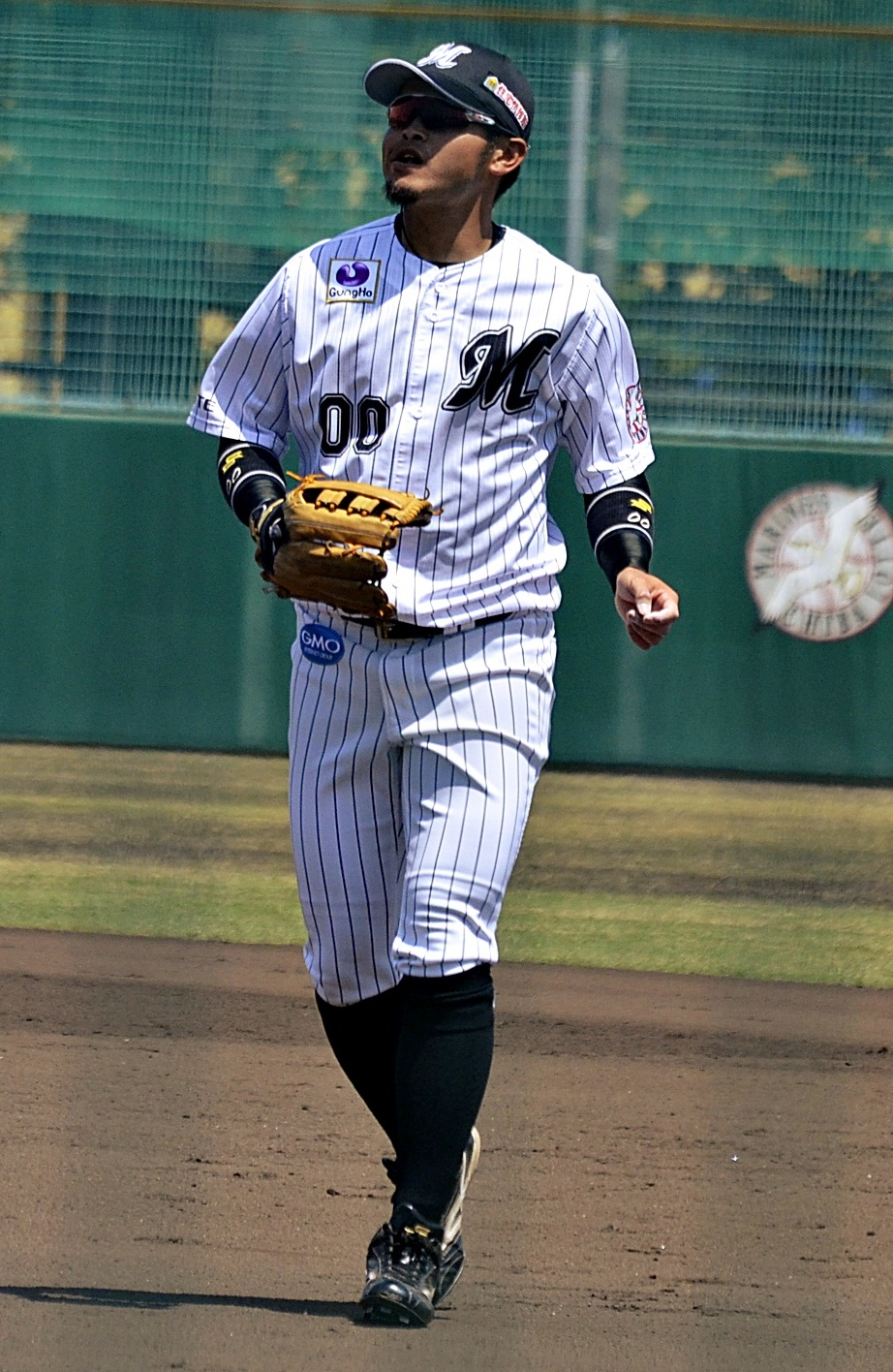 ロッテの柴田講平選手